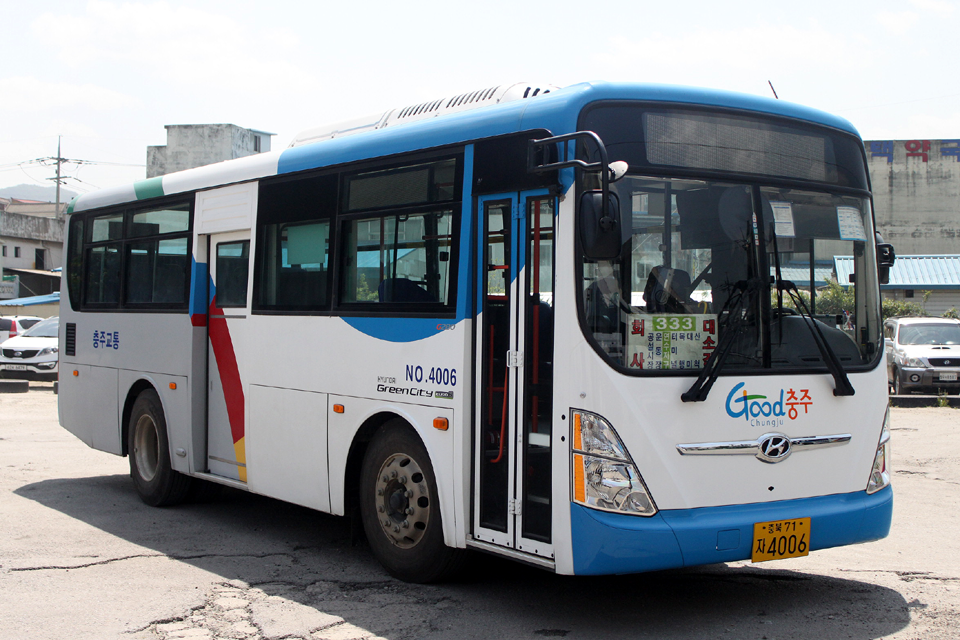 충주시내버스에서 운행 중인 현대 그린시티 2015년식.